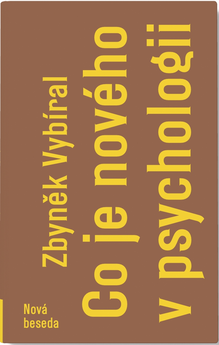 Obálka knihy Zbyňka Vybírala, která vyšla v nakladatelství Nová beseda v Praze.